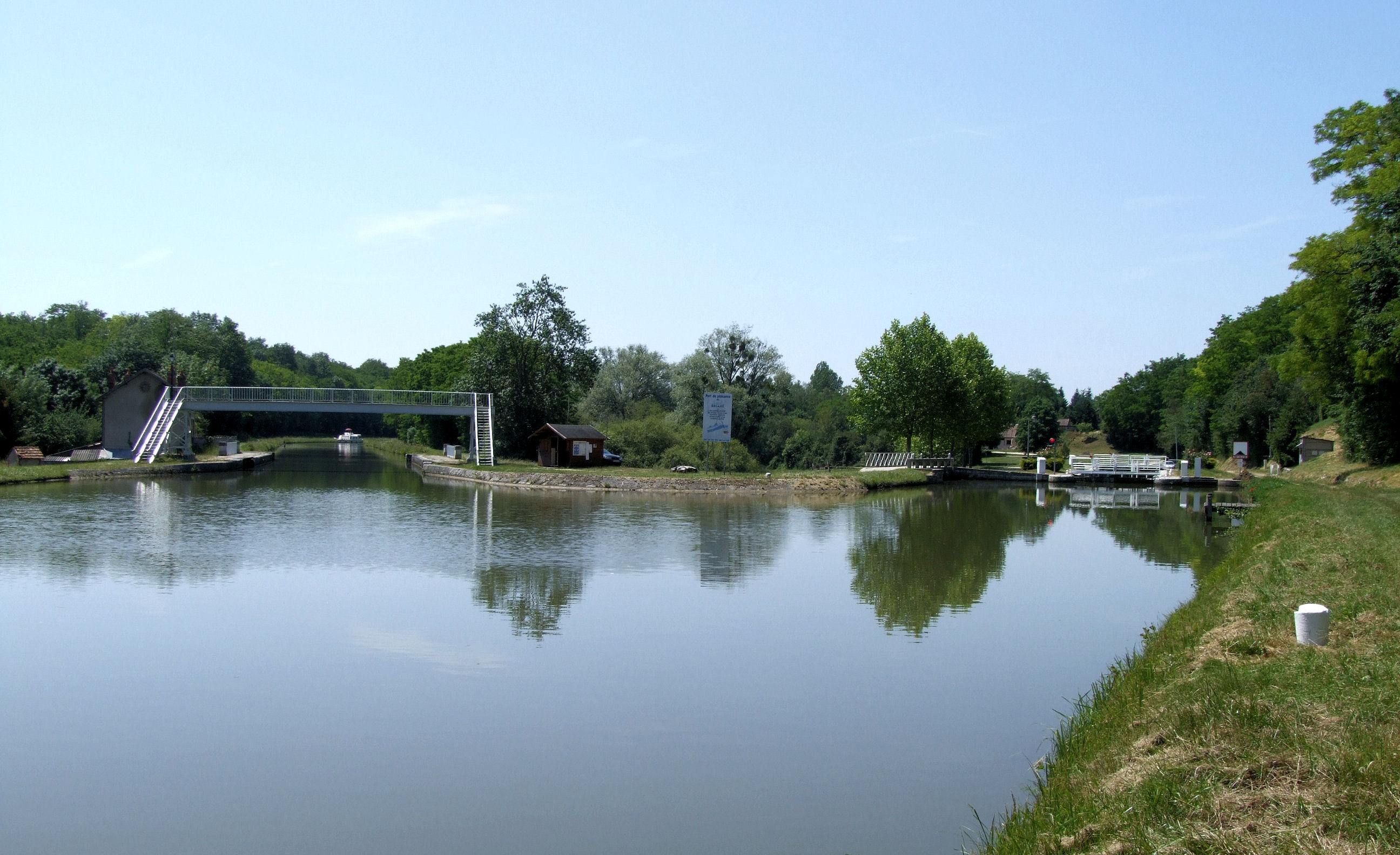 Canal de Briare - Halte nautique et les deux branches du canal à Briare : à gauche, vers le pont-canal, à droite, le premier tracé vers la ville de Briare